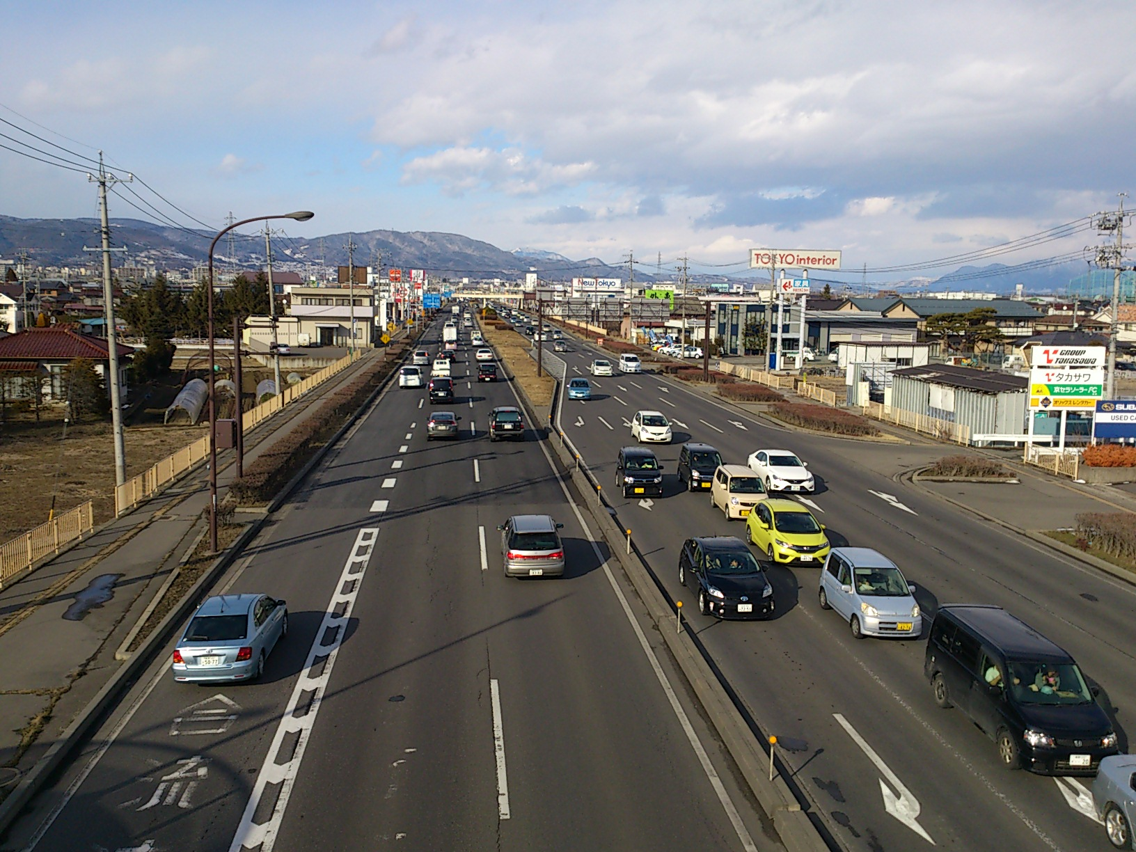 国道18号篠ノ井バイパス（長野県長野市青木島町大塚）